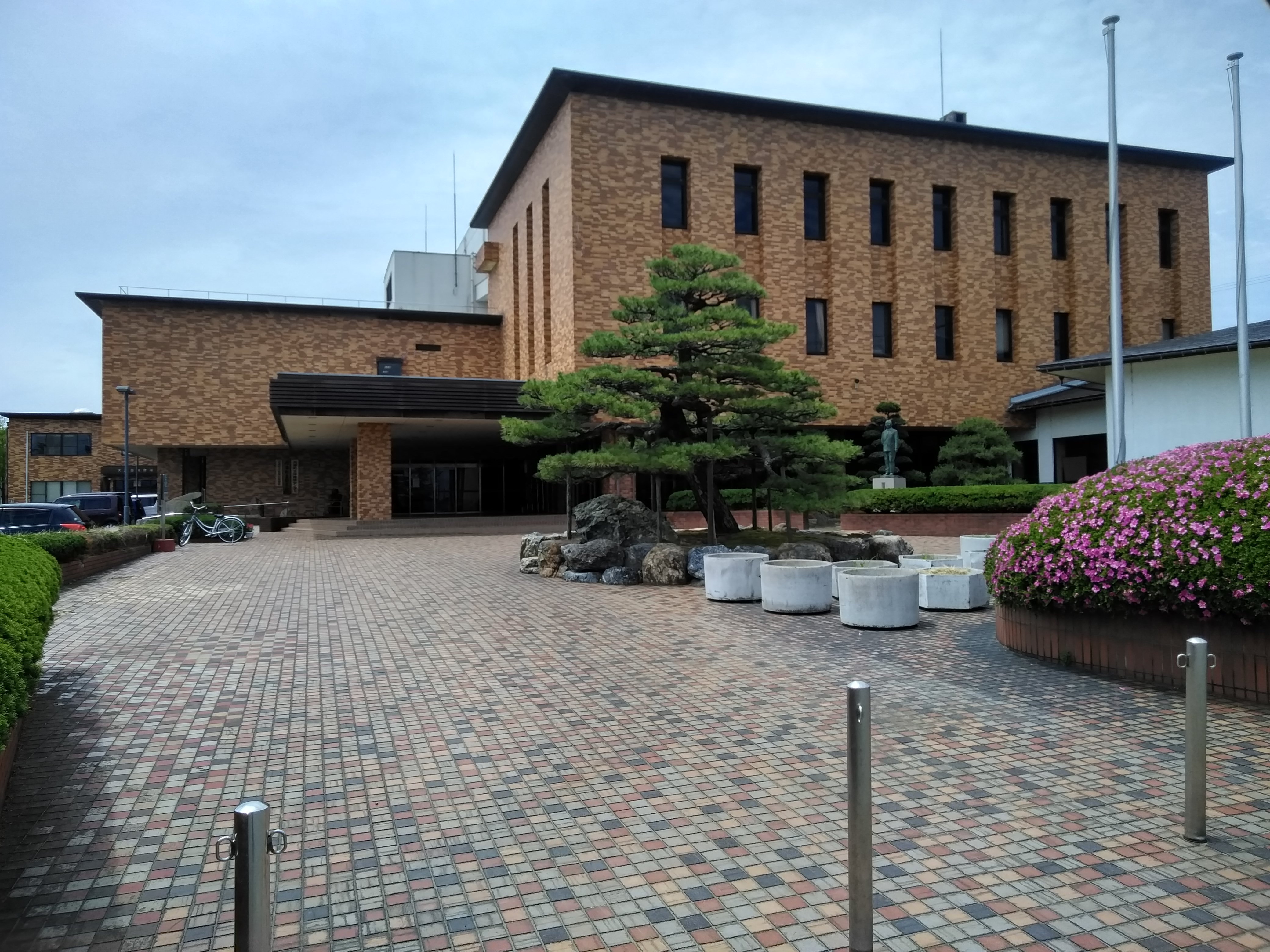 内灘町文化会館